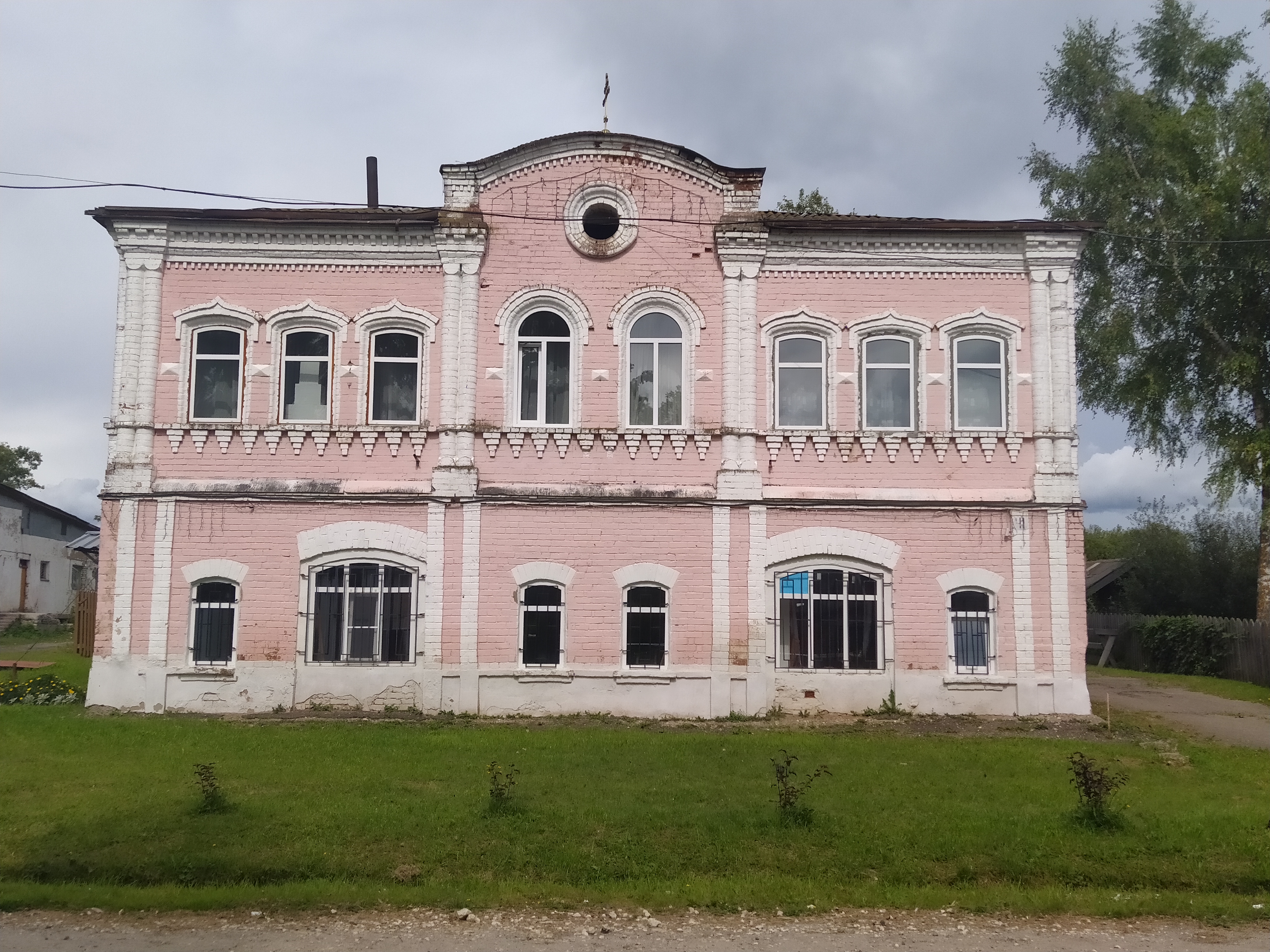 Фото дома в Хмелевицах